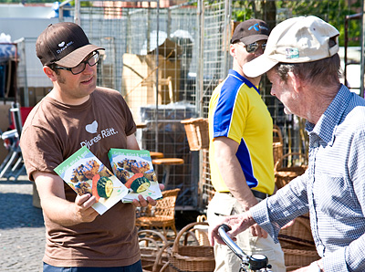 Djurens Rätt på torget i Varberg 1 juli 2009.